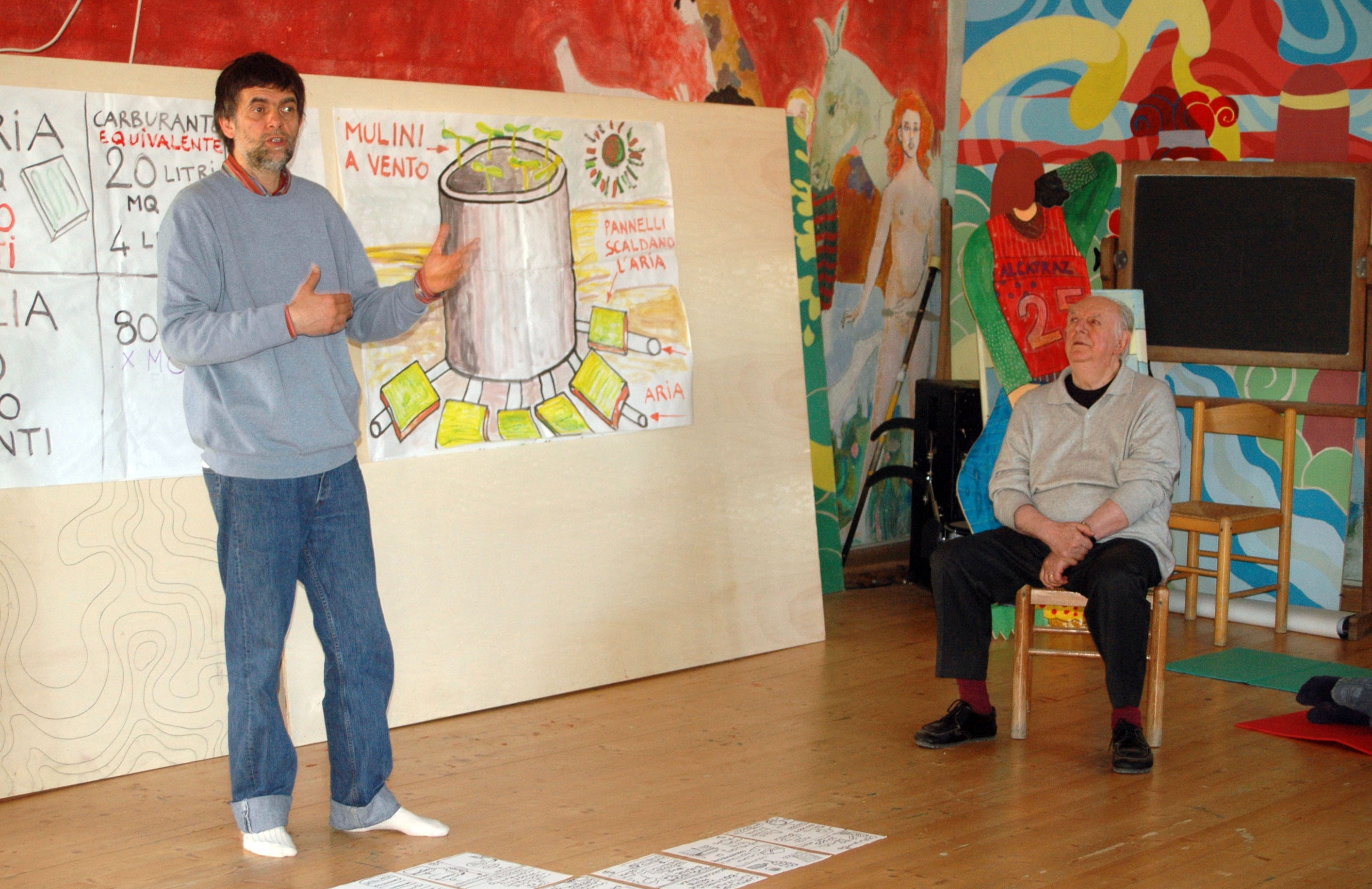 Lo scrittore Jacopo Fo, con il padre Dario, alla Libera Università di Alcatraz presso Gubbio